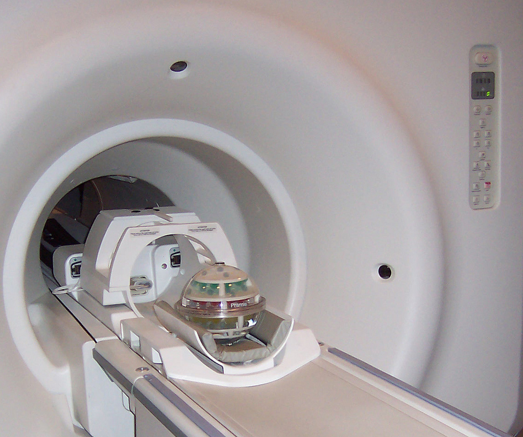 A MRI